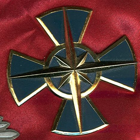 Eigen verzameling. Robert Prummel Groningen eigen scan Het kruis is lastig te fotograferen omdat het erg veel licht terugstraalt en onregelmatig van vorm is. Dit is een borstkruis van de Commandeurs der Eerste Klasse (zonder kroon).